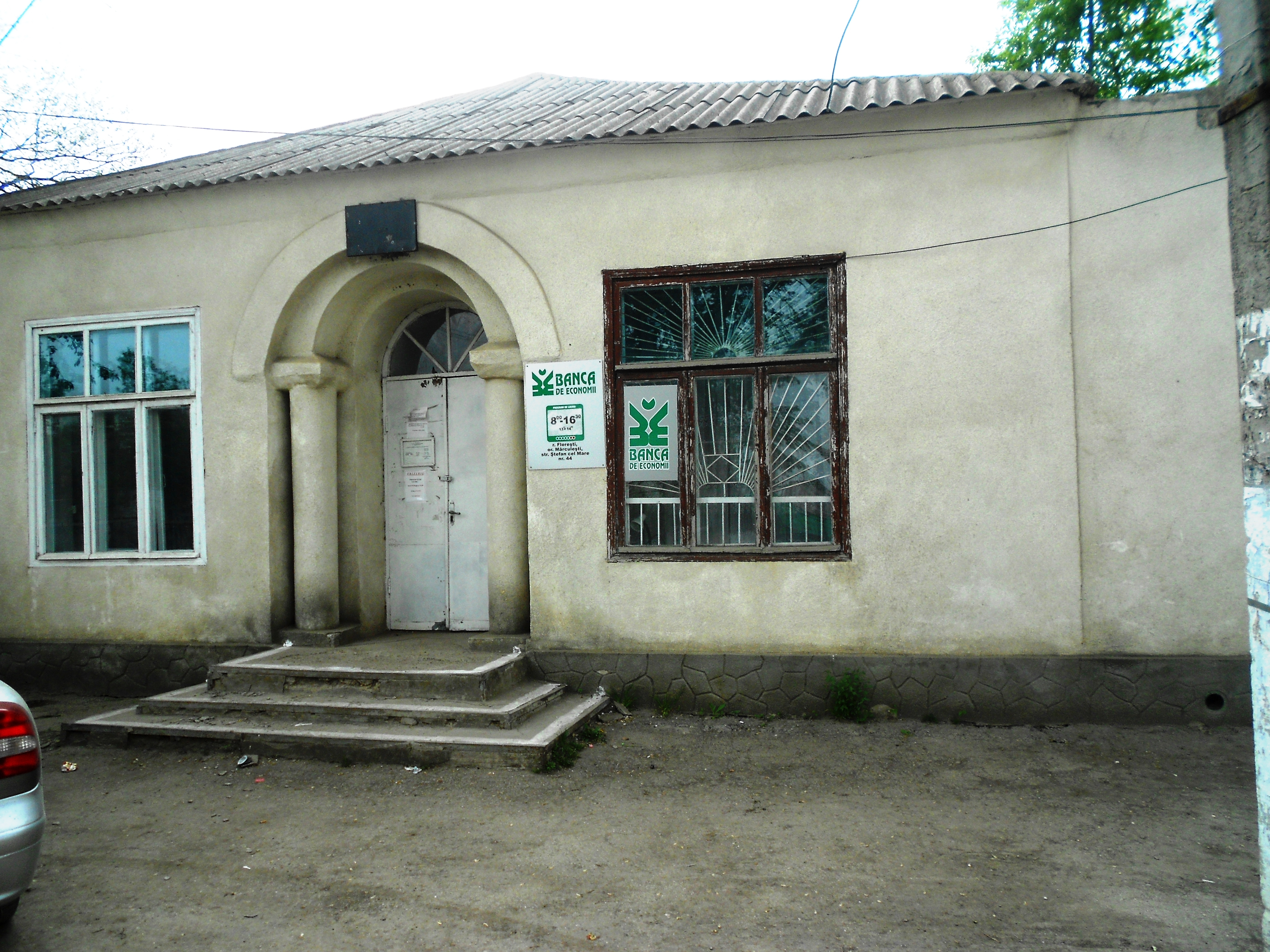 Oficiu al BEM din Mărculești, r. Floreşti